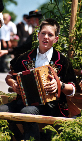 Jugendlicher Schwyzerörgeli-Spieler in Buochs